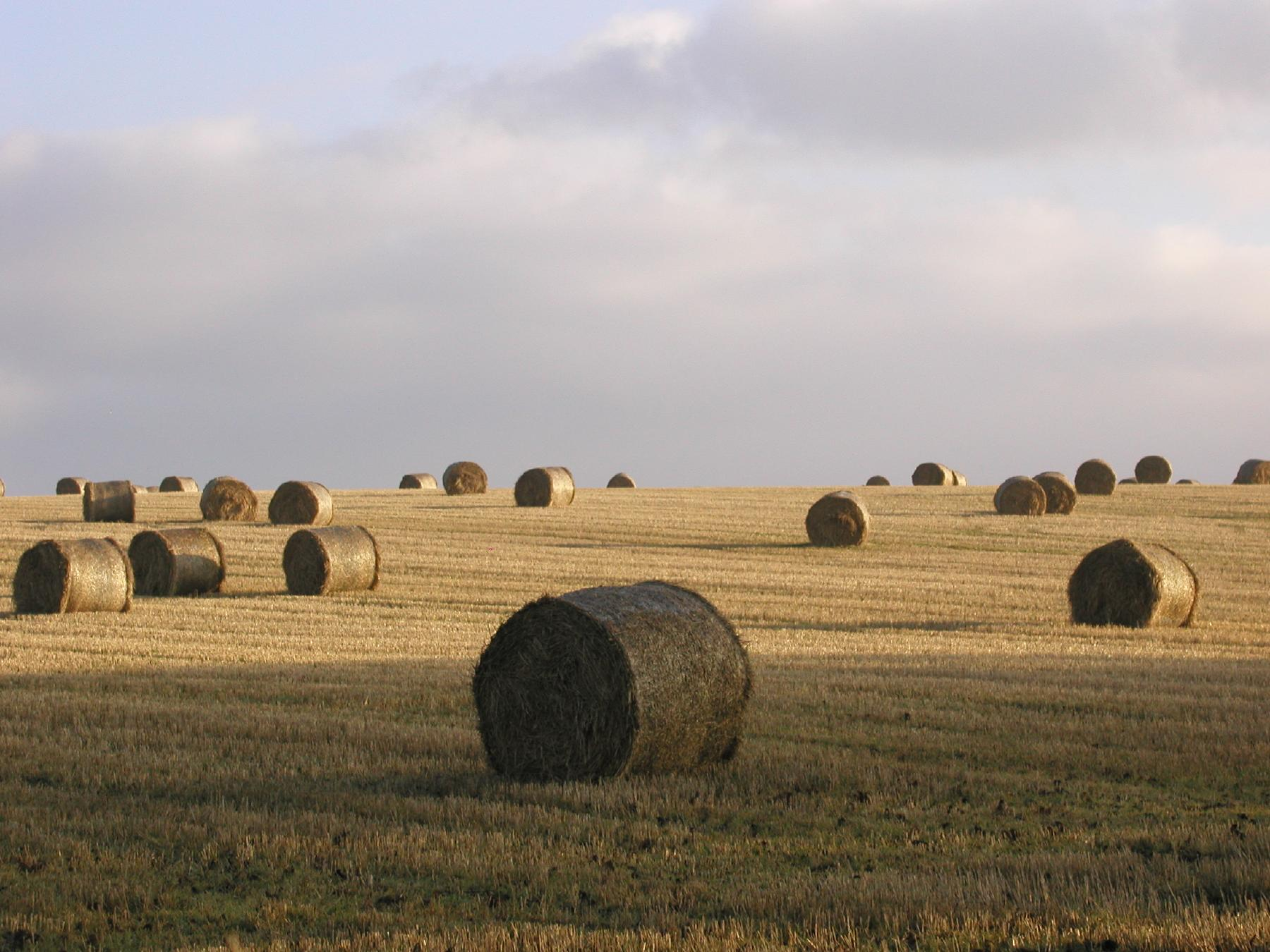 At Glendronach Distillery